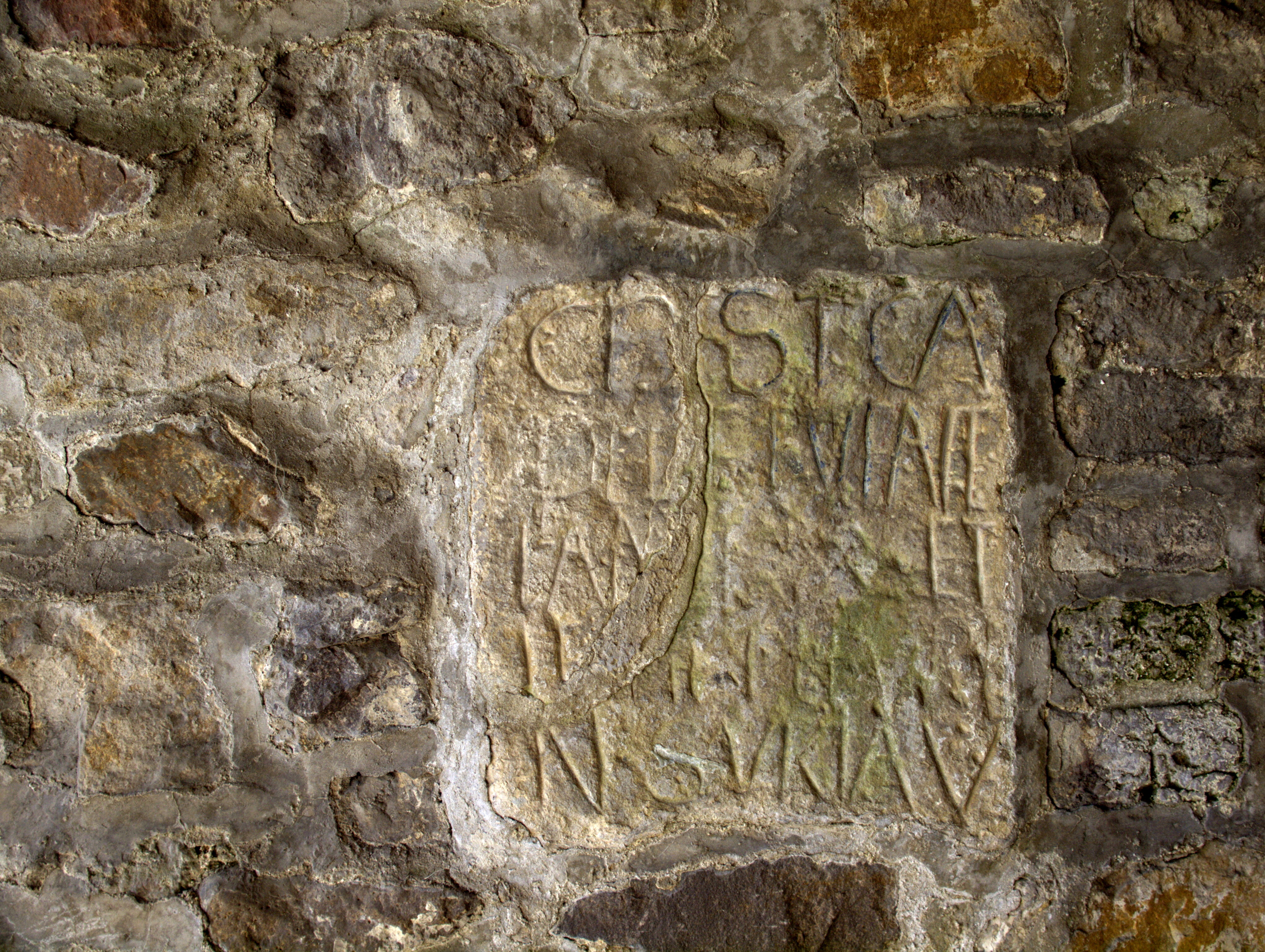 Chapelle Notre-Dame de Cambron: pierre de fondation (en grès) portant l'inscription CHEST CA / PELLE FV BATI / LAN 1483 ... / ... / NSN ... VICAV /